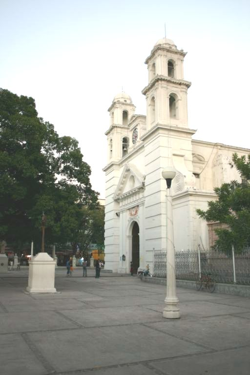 Iglesia de San Francisco en el centro de la ciudad de Iguala de la Independencia